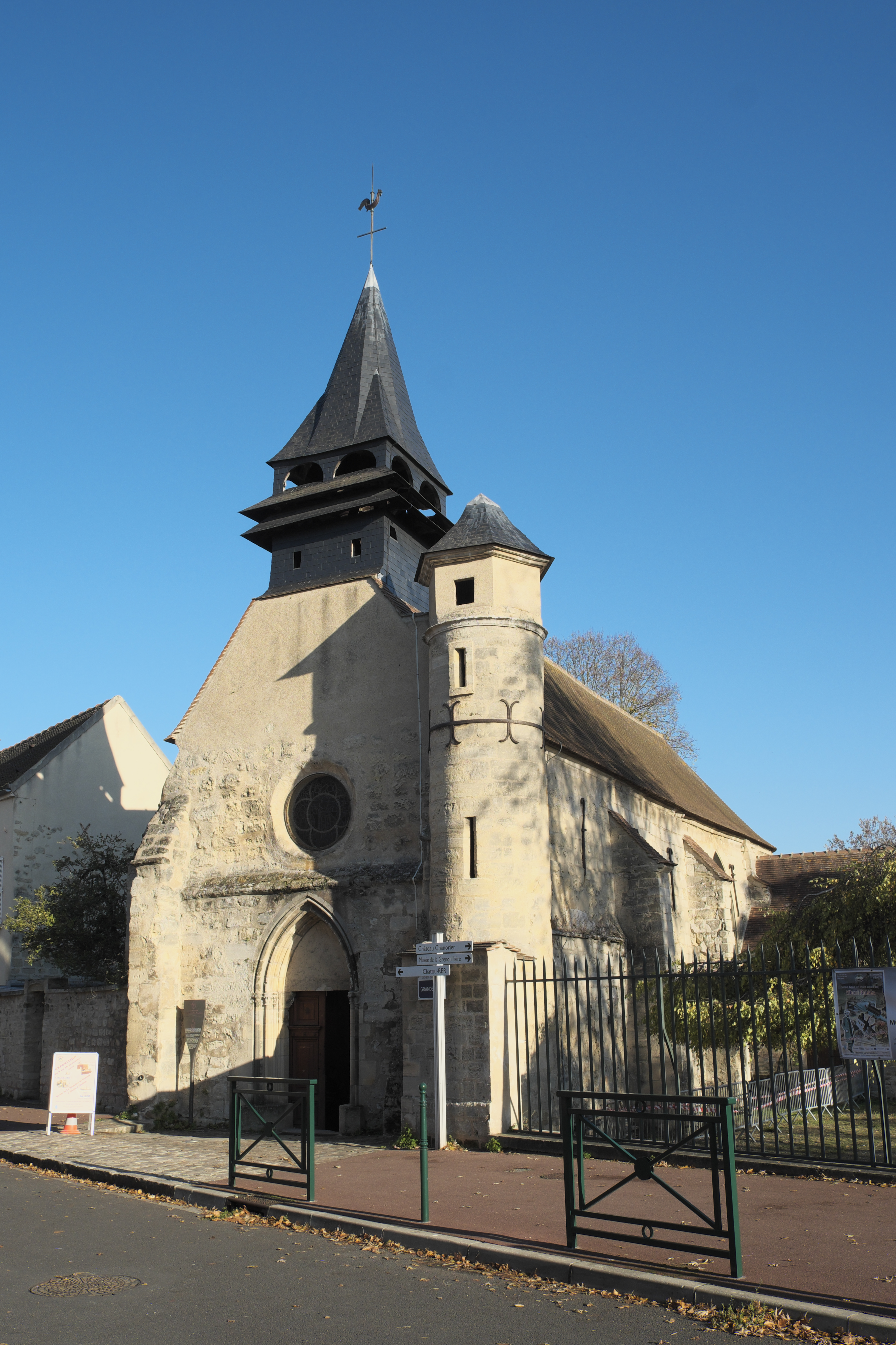 Katholische Kapelle Saint-Léonard, ehemalige Pfarrkirche, in Croissy-sur-Seine im Département Yvelines (Île-de-France/Frankreich)